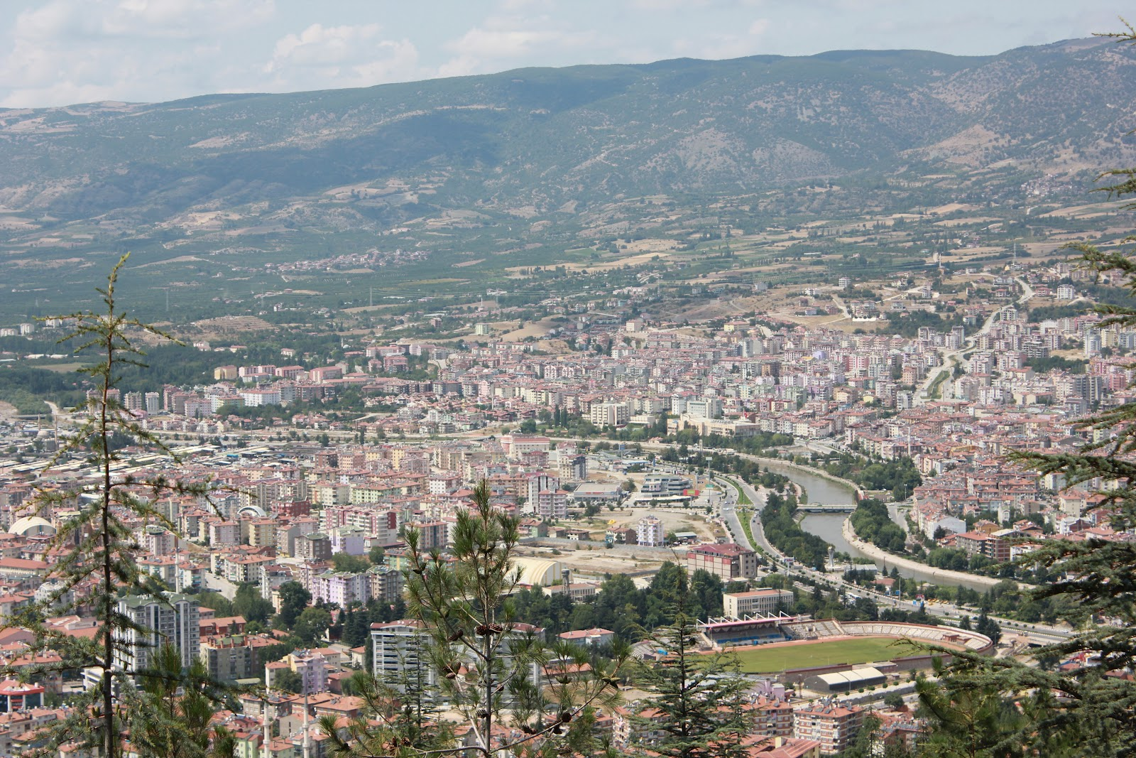 Tokat şehir merkezi panoraması.